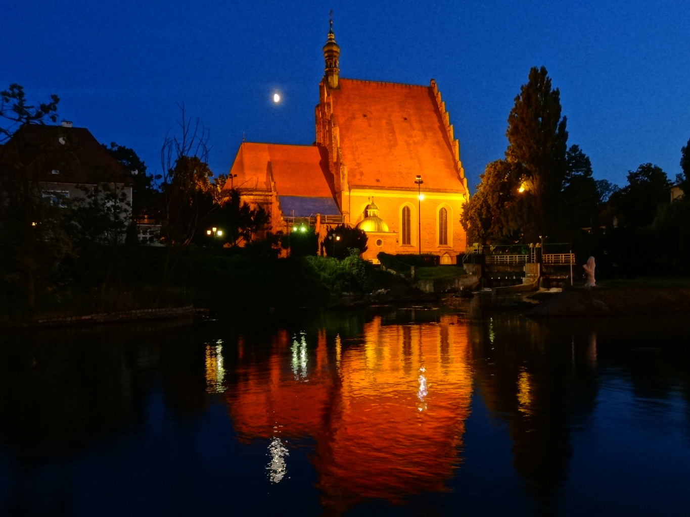 Katedra p.w. św. Marcina i Mikołaja w Bydgoszczy (XIV-XV wiek)